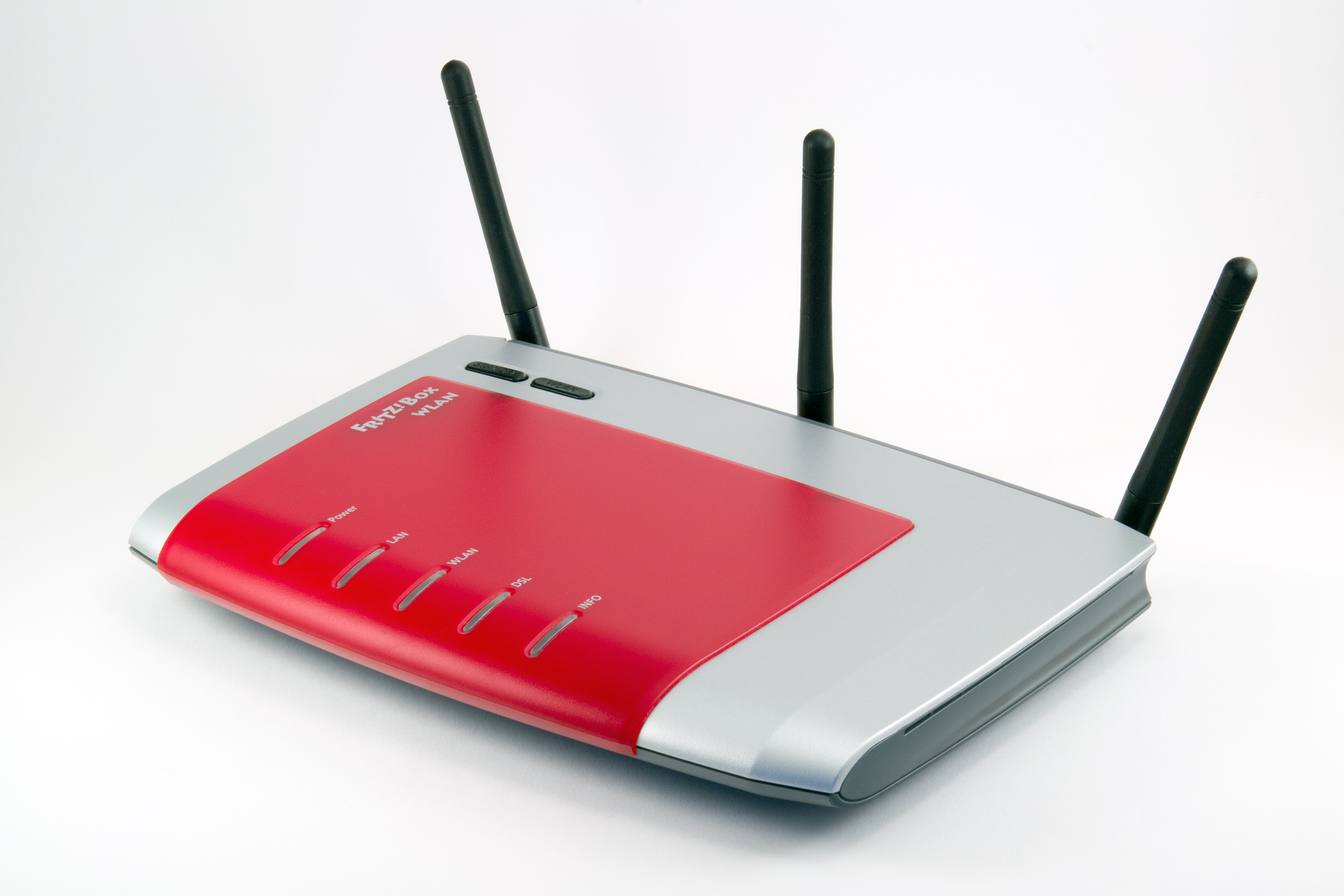 AVM FRITZ!Box WLAN 3270 (erste Version mit drei externen WLAN-Antennen)